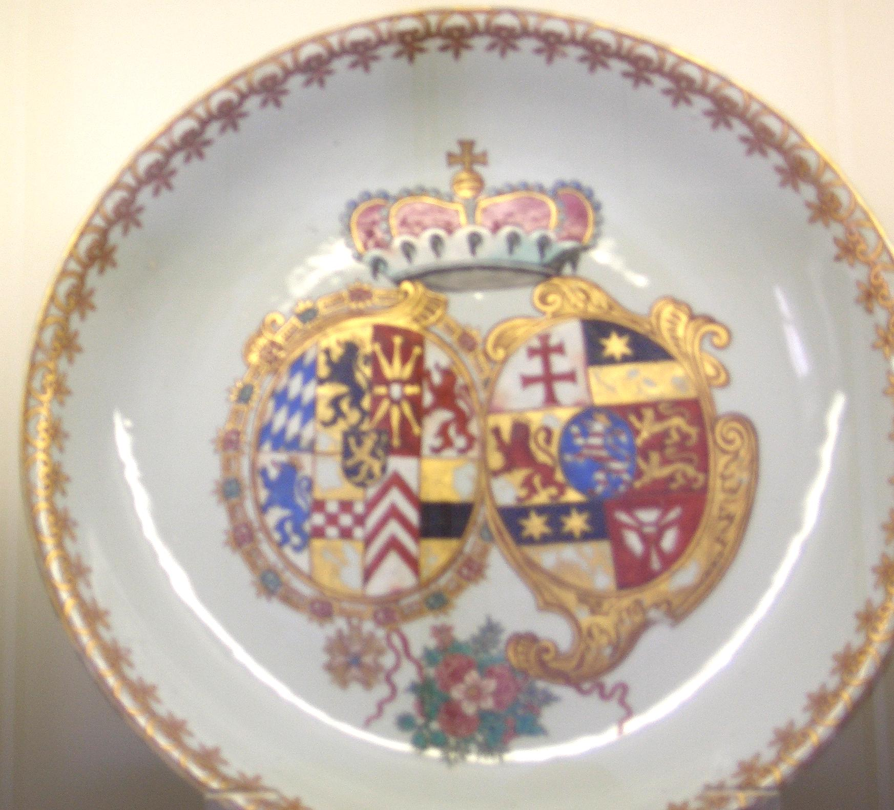 Chinese porcellain plate Made according to the order of the German House of Pfalz-Sulzbach Qianlong Period; Qing Dynasty Münchener Residenzmuseum Photographer: user:Dr. Meierhofer Date: 19.08.2006